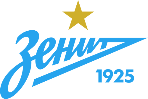 Official Logo of FC Zenit Saint Petersburg 2015 // Эмблема футбольного клуба «Зенит» Санкт-Петербург